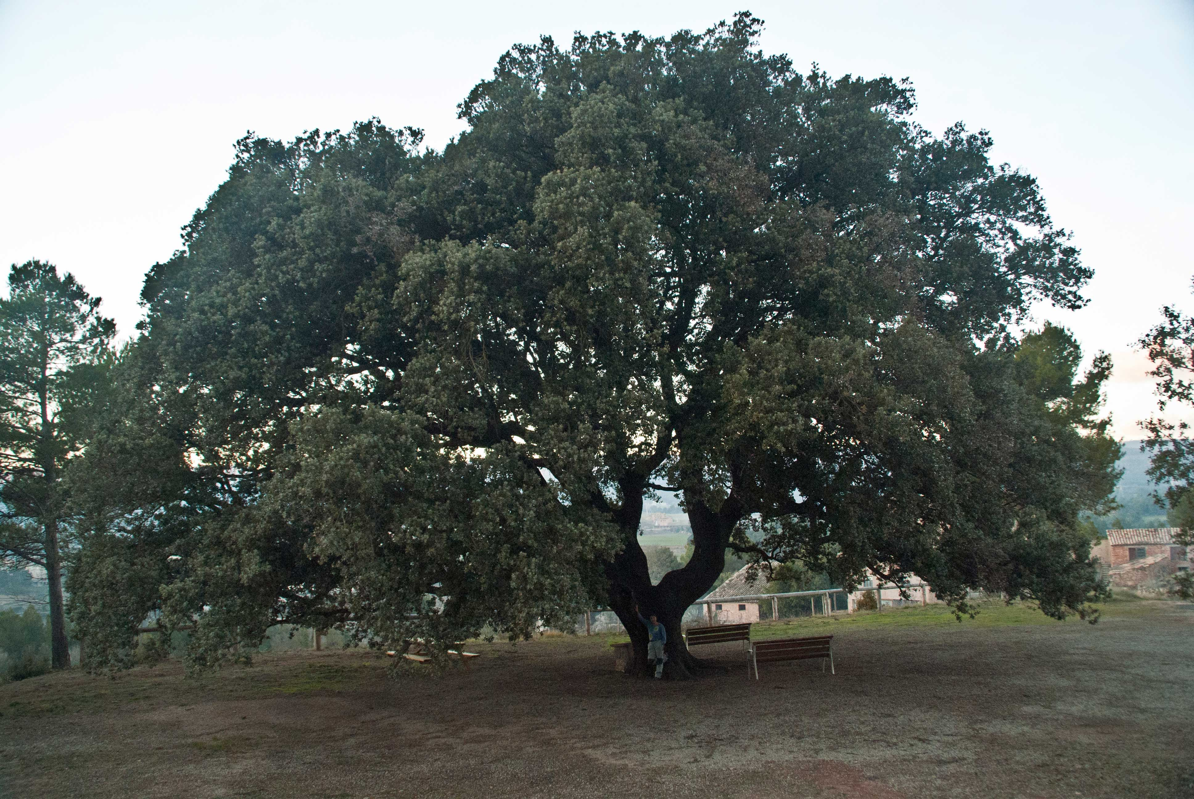 Alzina Grossa de Querol (Fonollosa) This is a a photo of a protected or outstanding tree in Catalonia, Spain, with id: MA-07.084.01